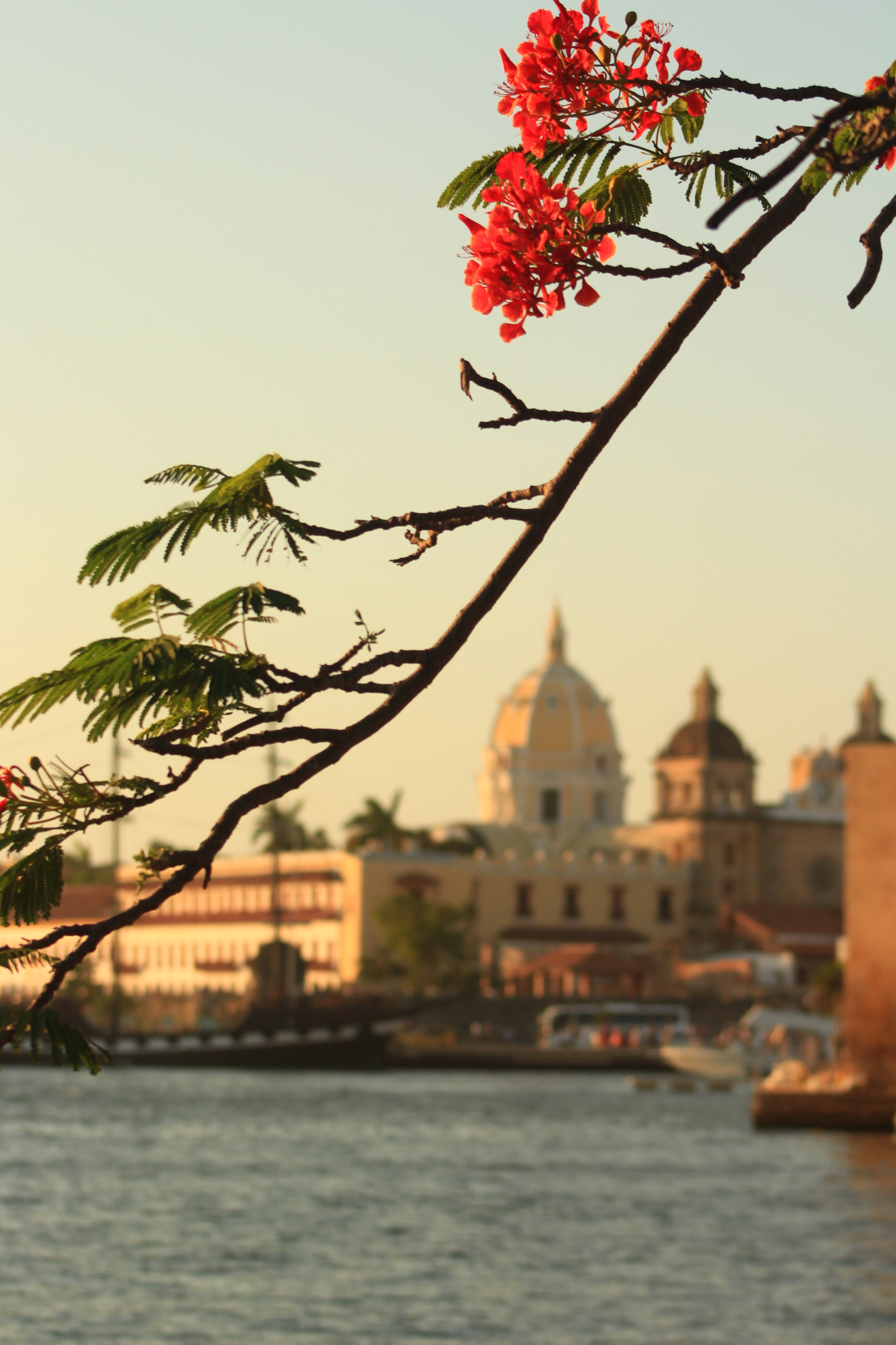 Atardecer común en la ciudad amurallada. La foto fue tomada desde la bahía de Cartagena con vista a la iglesia de San Pedro Claver